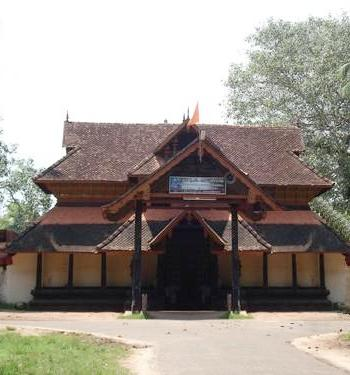 Kandiyur Siva Temple Tower